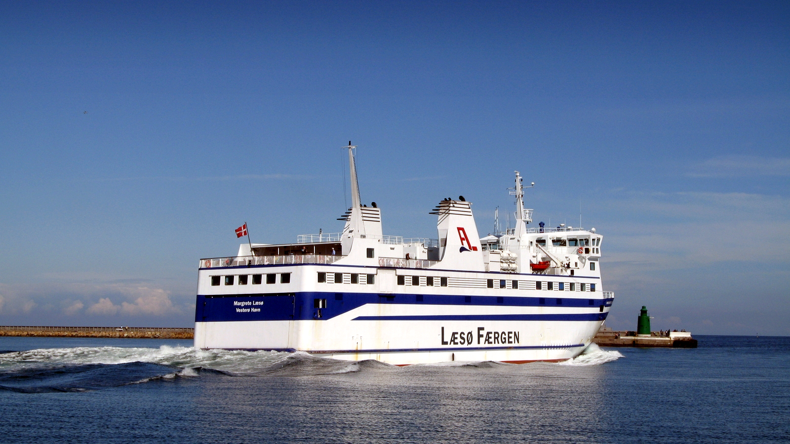 Margrete Læsø IMO 9139438